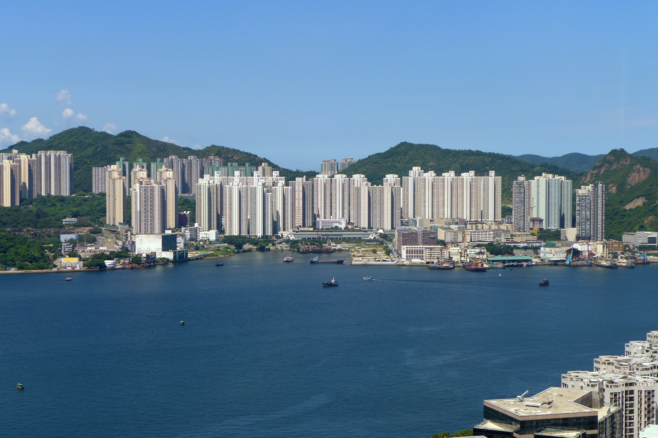 Yau Tong Overview